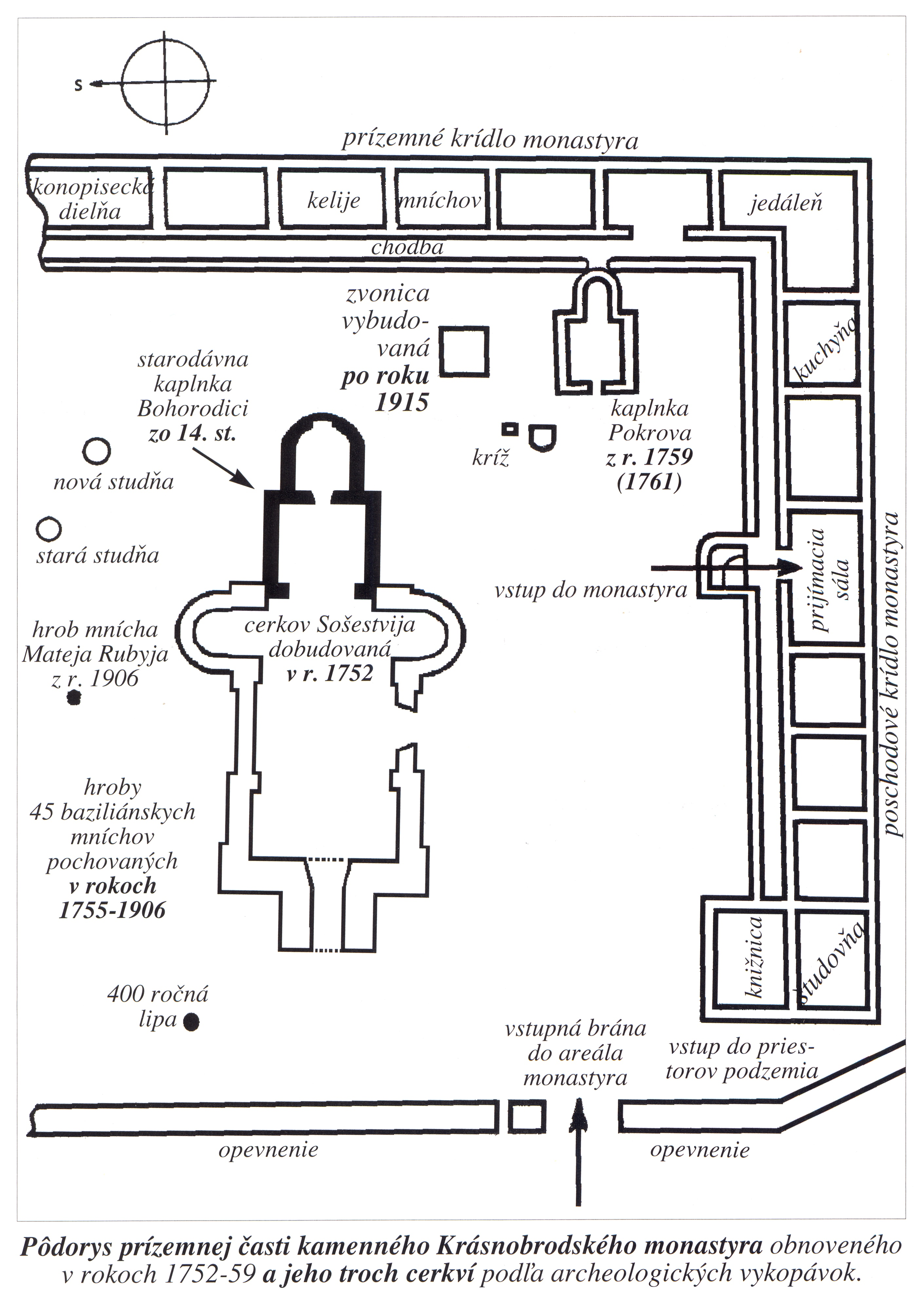 Pôdorys monastiera podľa archeologických vykopávok. Document made by Timkovič - published in his book...